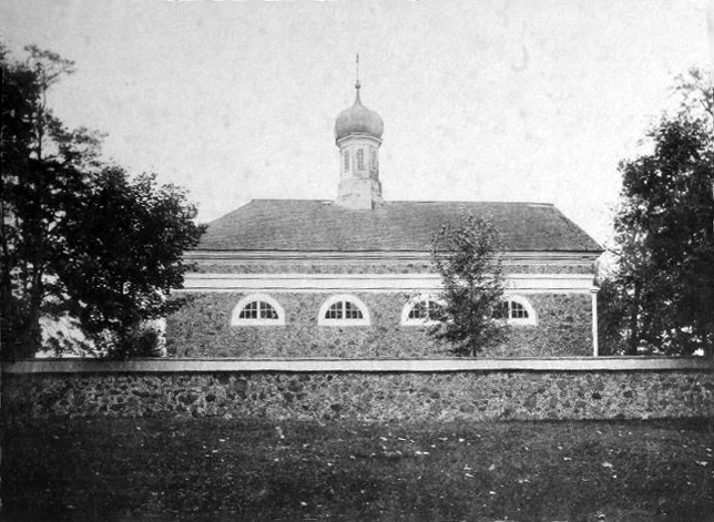 Беларуская (тарашкевіца): Накрышкі (Nakryški). Царква